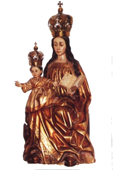 Nuestra Señora del Espino de Santa Gadea del Cid, Miranda de Ebro (España).